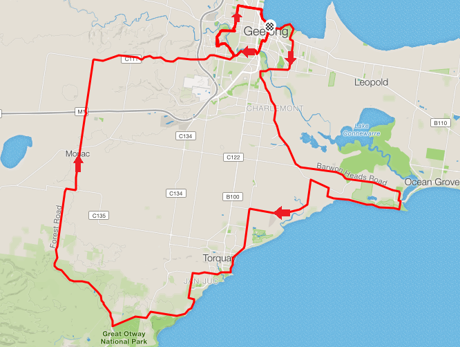 Ruta desta edición